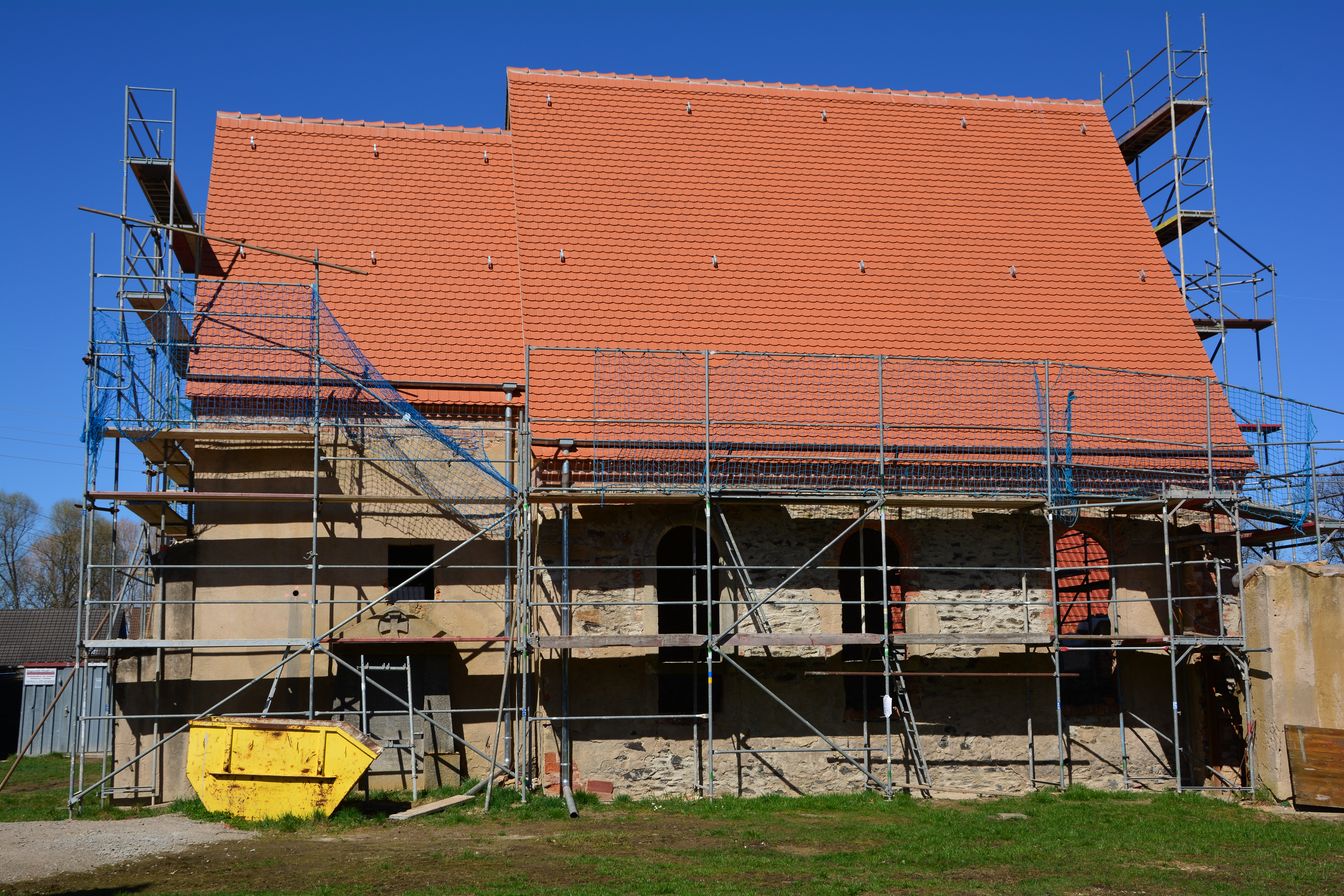 Kirche in Canitz (Liebschützberg):umfangreiche Dacharbeiten. Das Dach über den Kirchenschiff und dem Turmstumpf bildet einen geschlossenen Kirchenraum, ähnlich der vor 700 Jahren errichteten Canitzer Kirche. Zustand April 2018